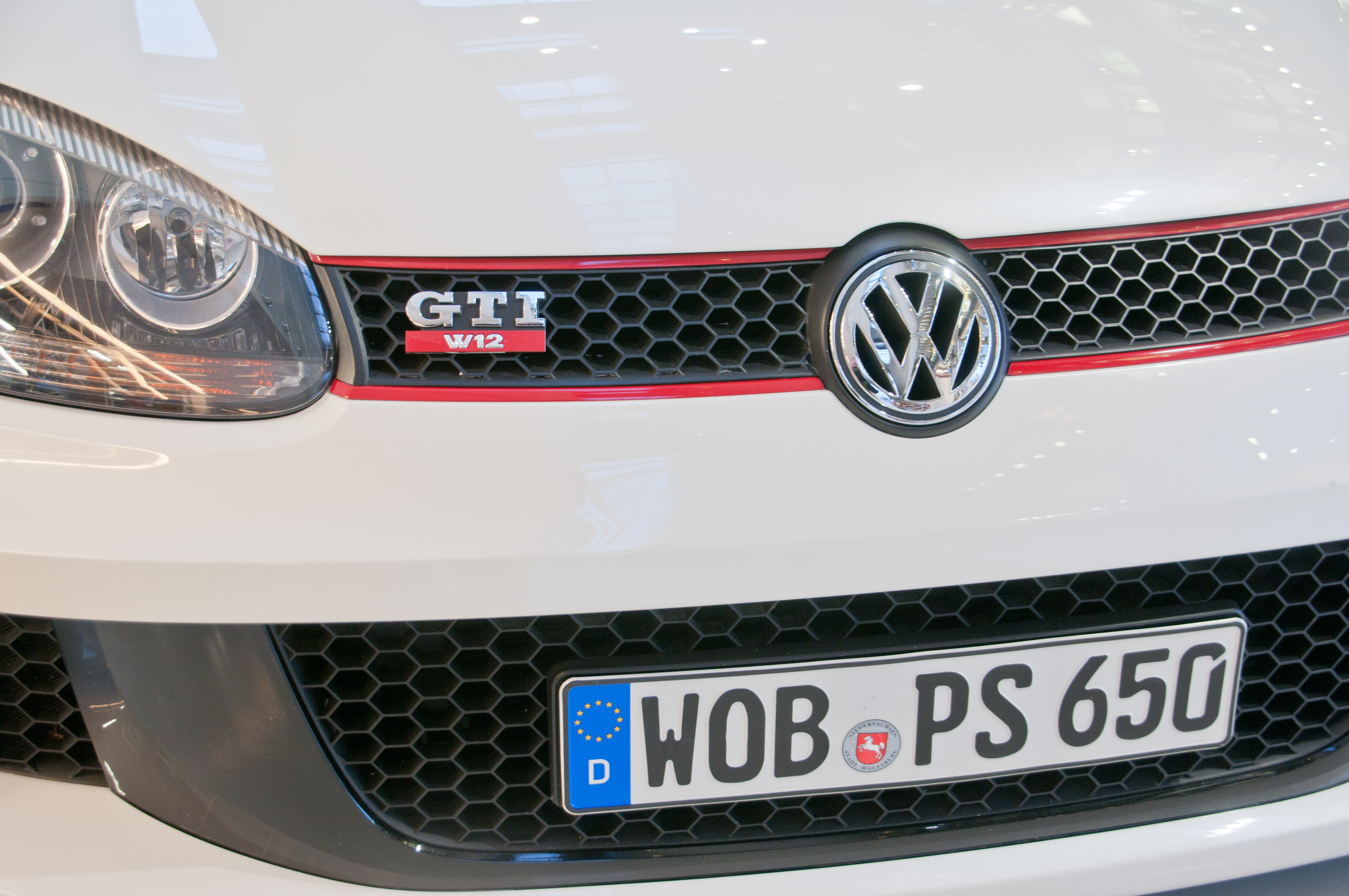 Autostadt Wolfsburg Golf GTI W12-650 mit 650 PS